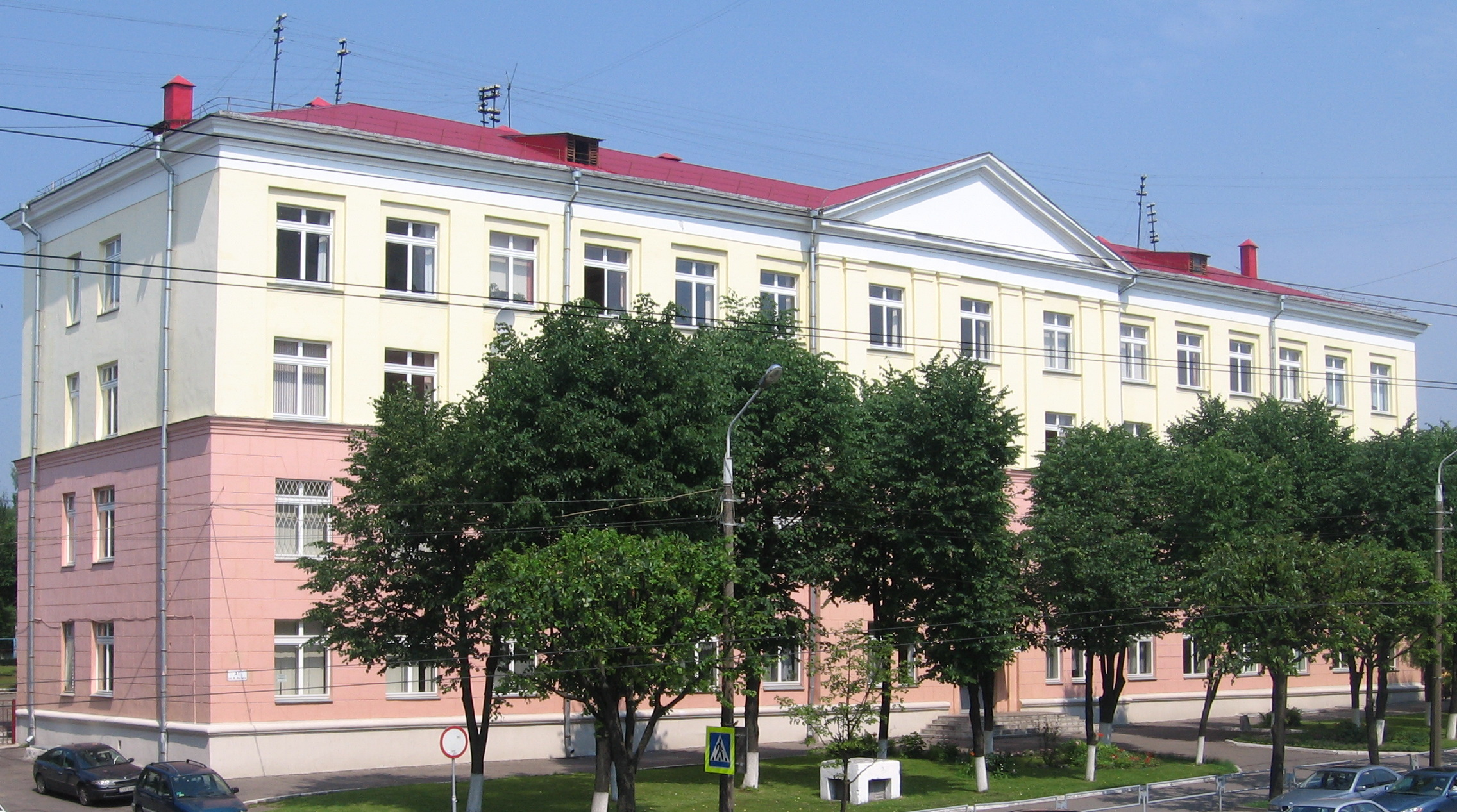 гимназия №8, Минск, Беларусь